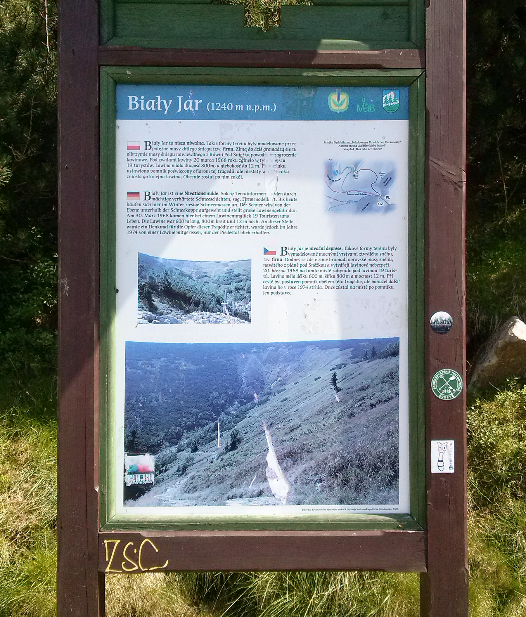 Tablica informacyjna ustawiona obok szlaku